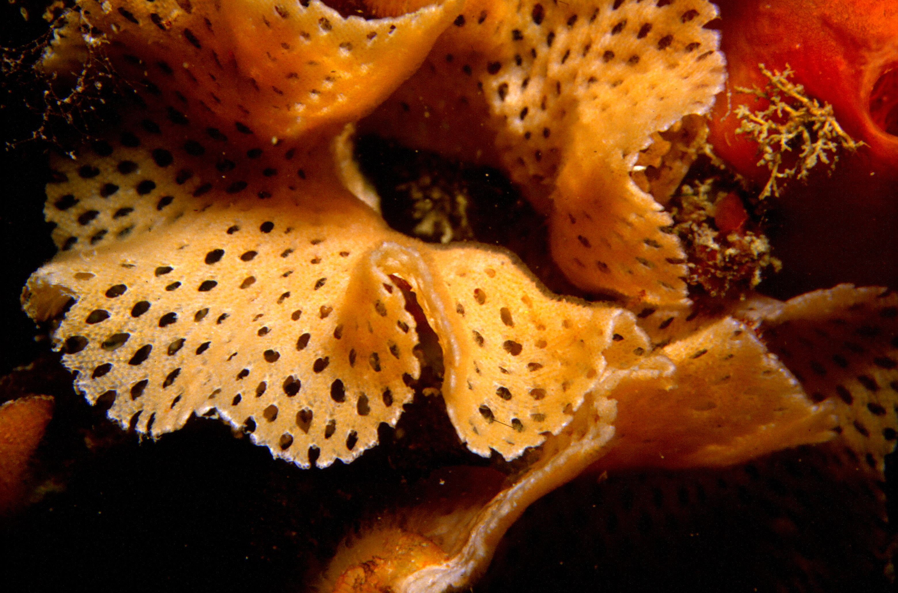 Reteporella grimaldii Julien in Julien & Calvet, 1903 - Banyuls-sur Mer : 04/85